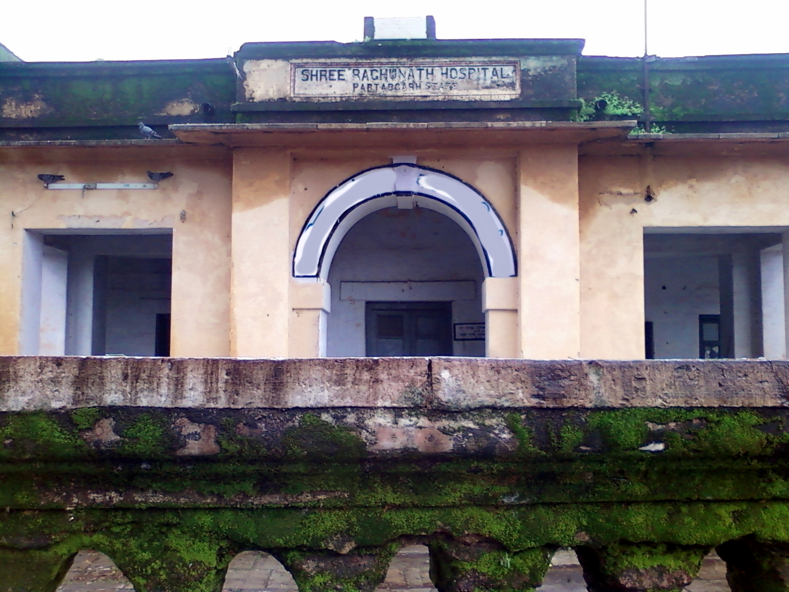 प्रतापगढ़ का रियासतकालीन ज़नाना अस्पताल